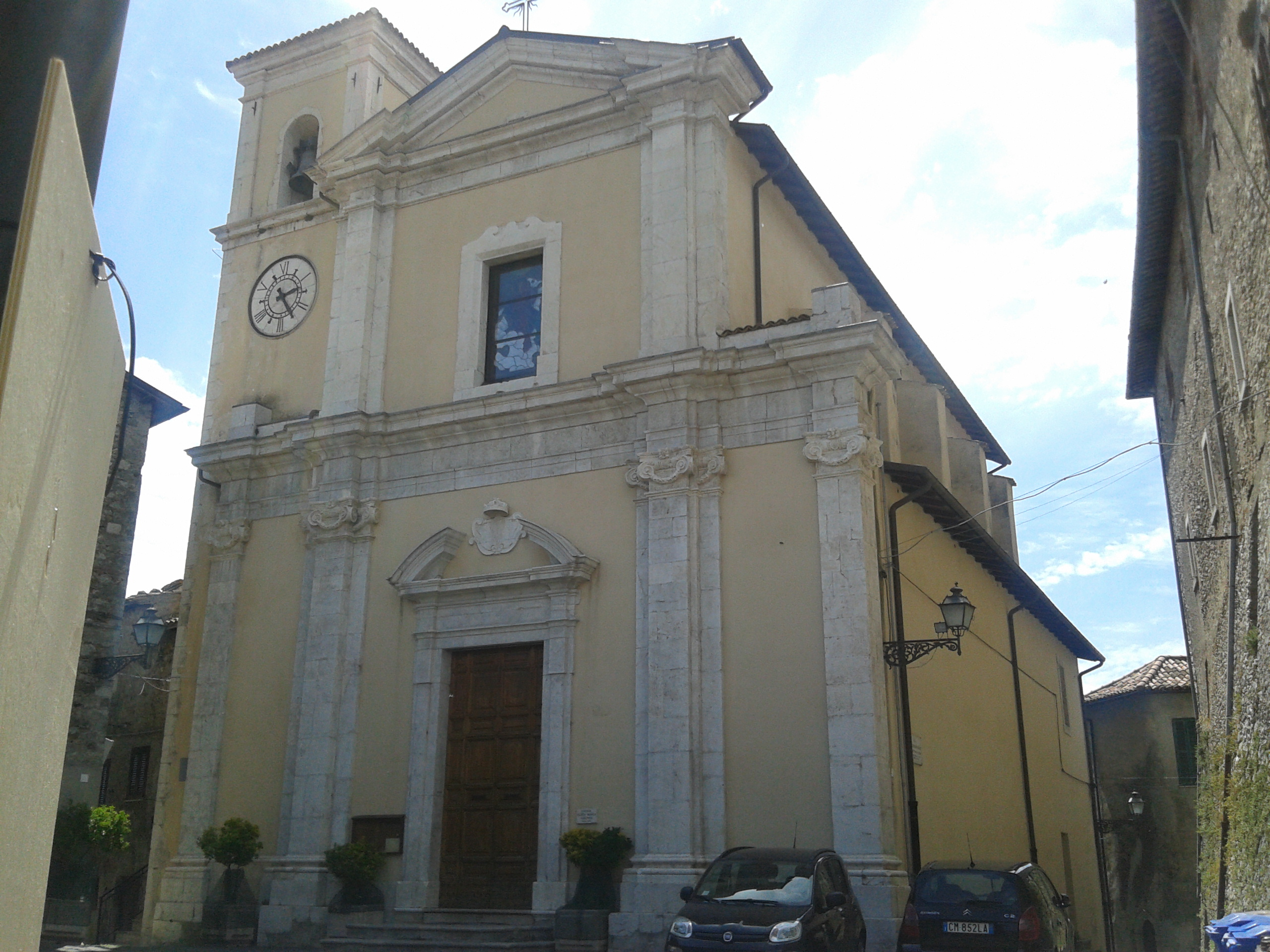 Chiesa di Santa Maria Assunta a Poggio Cinolfo